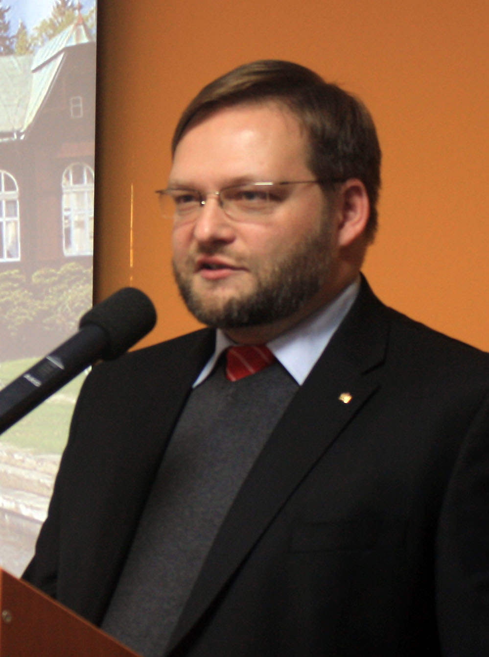 Petr Nohel na Generálním sněmu Koruny České 2017